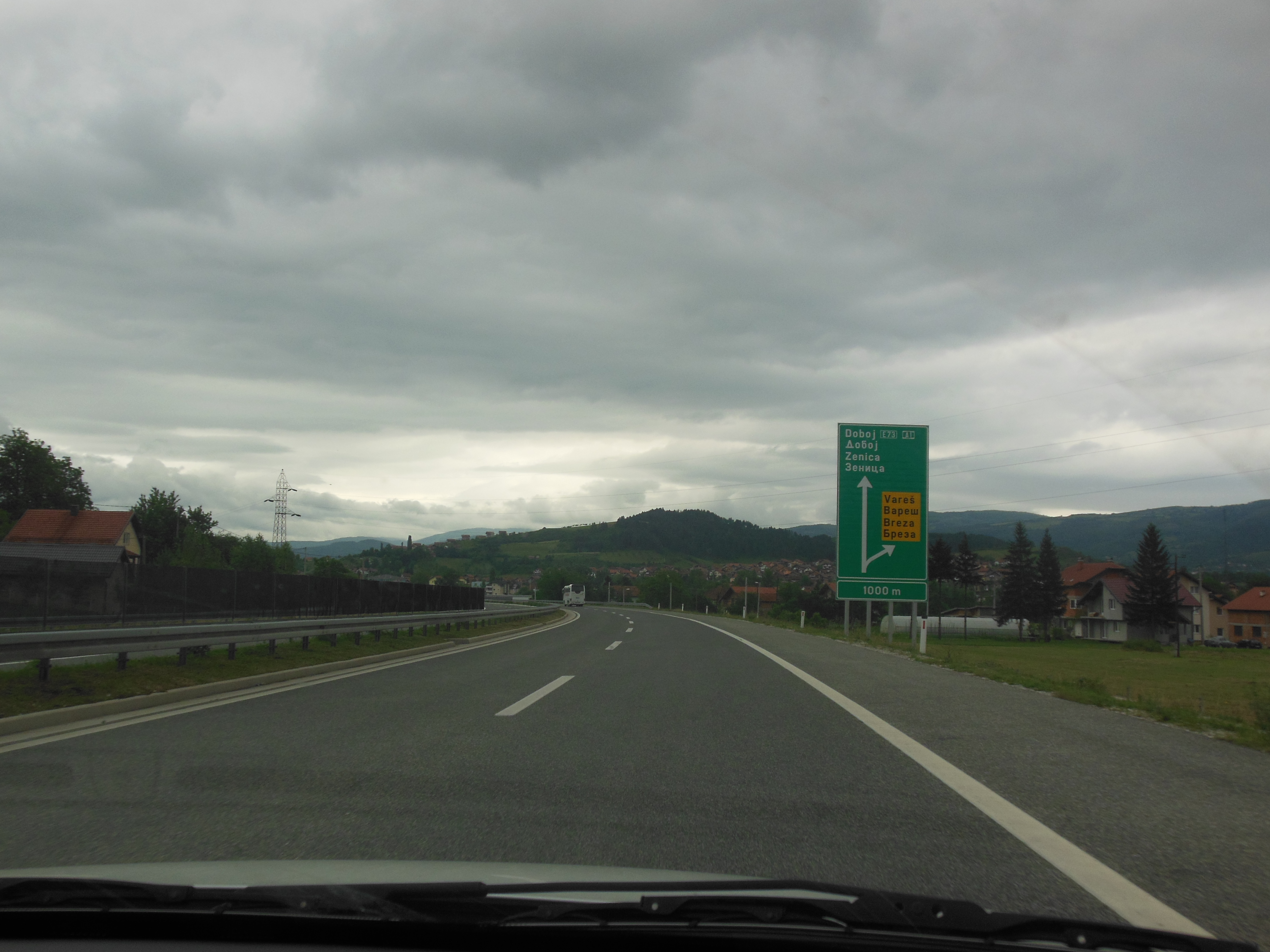 Bosnian A1